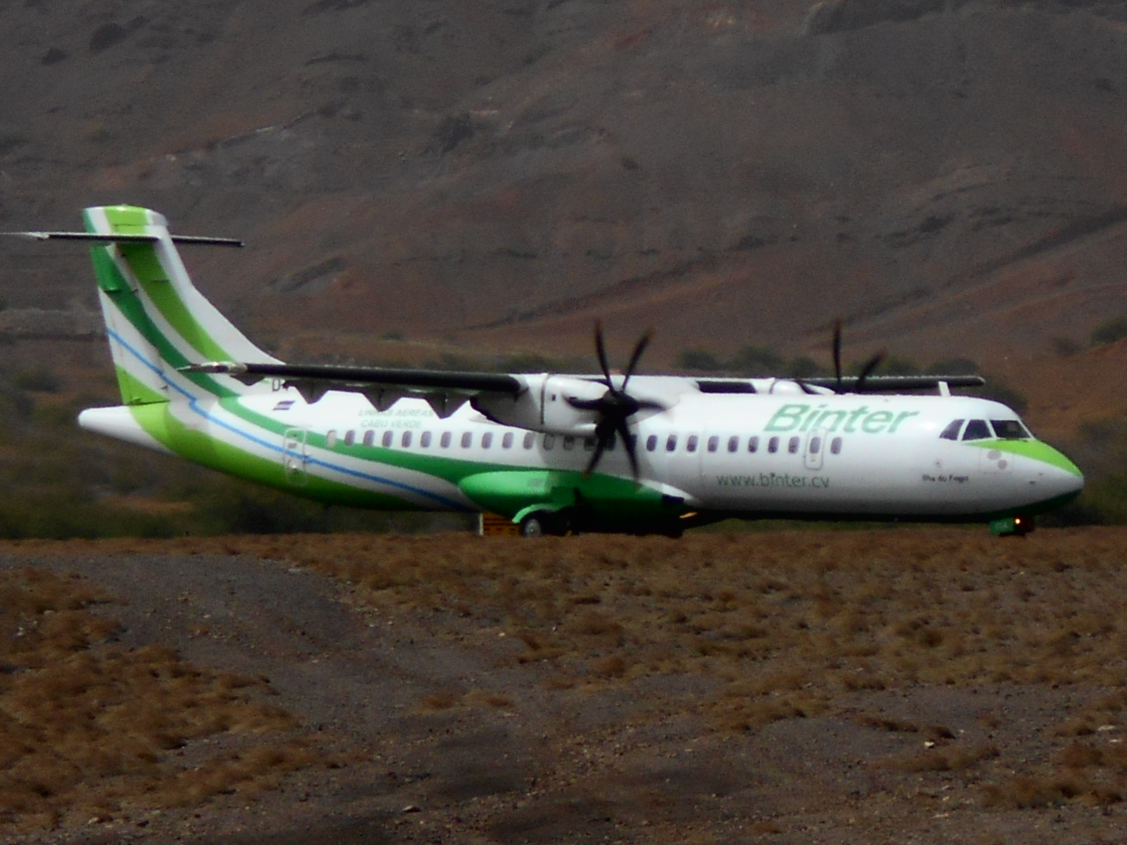 Un aeromobile della Binter CV a VXE preparando per il decollo D4-CCA